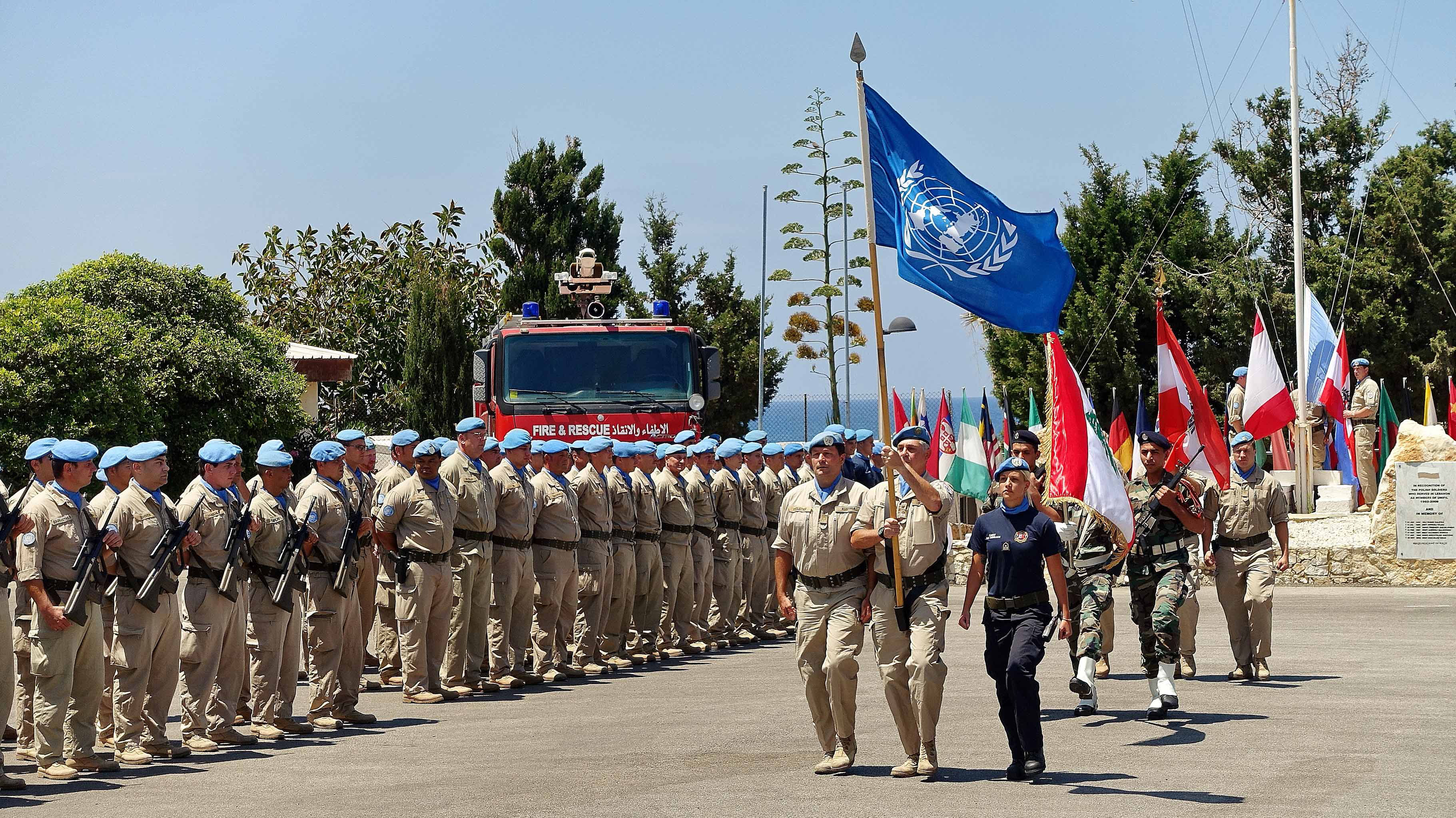 Der Insignientrupp der österreichischen UNIFIL-Soldaten marschiert im Camp Naqoura ein. Gleich erhalten die Peacekeeper ihre Einsatzmedaillen der Vereinten Nationen.